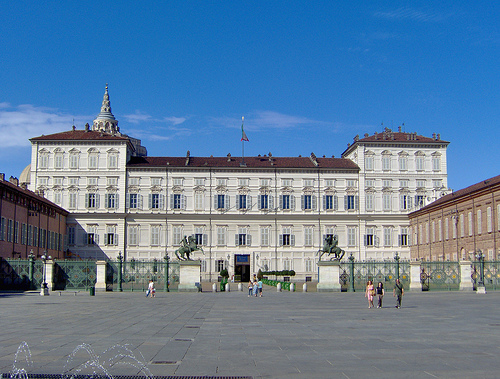 Ario Gaviore